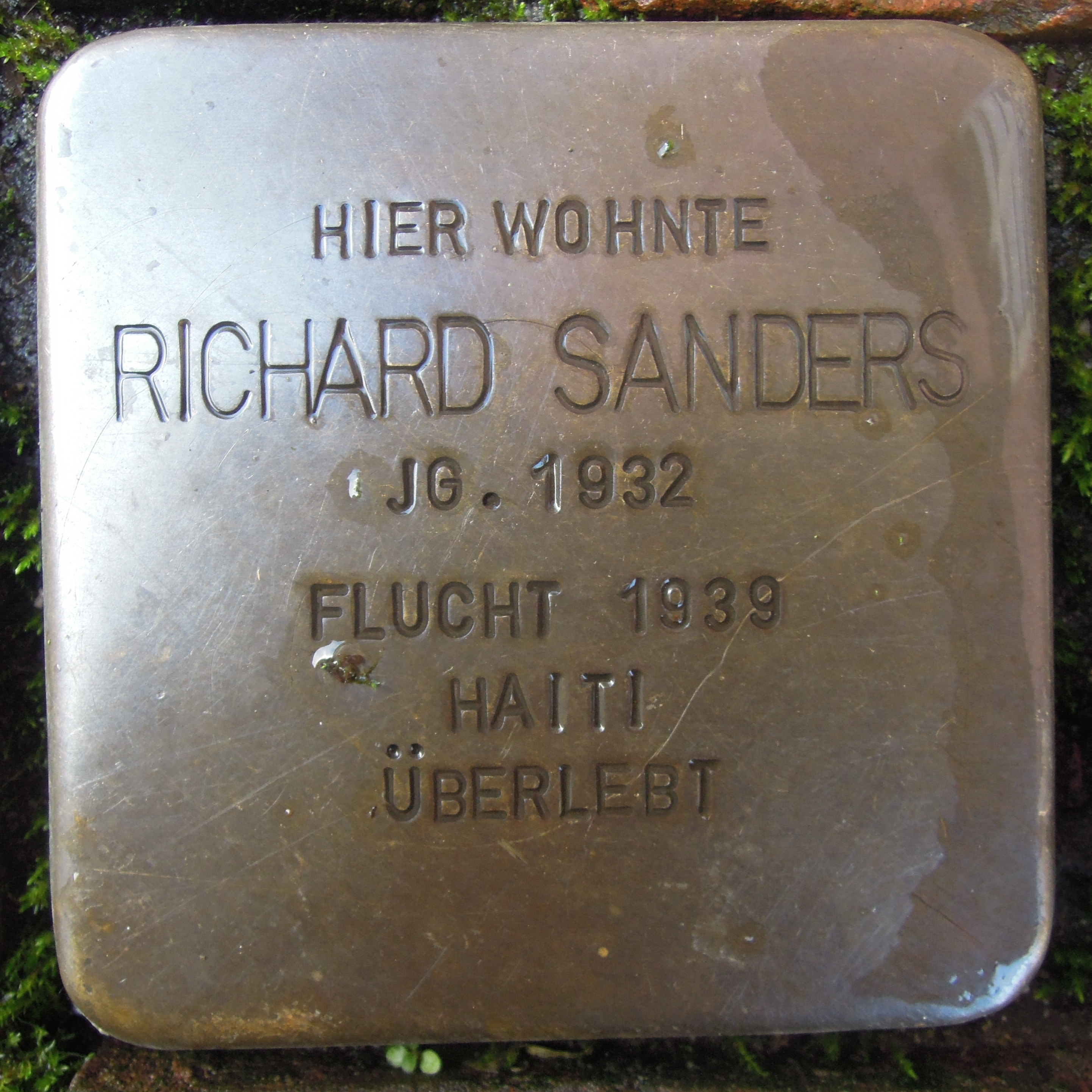 Stolperstein in Straelen, Mühlenstraße 10 für Richard Sanders